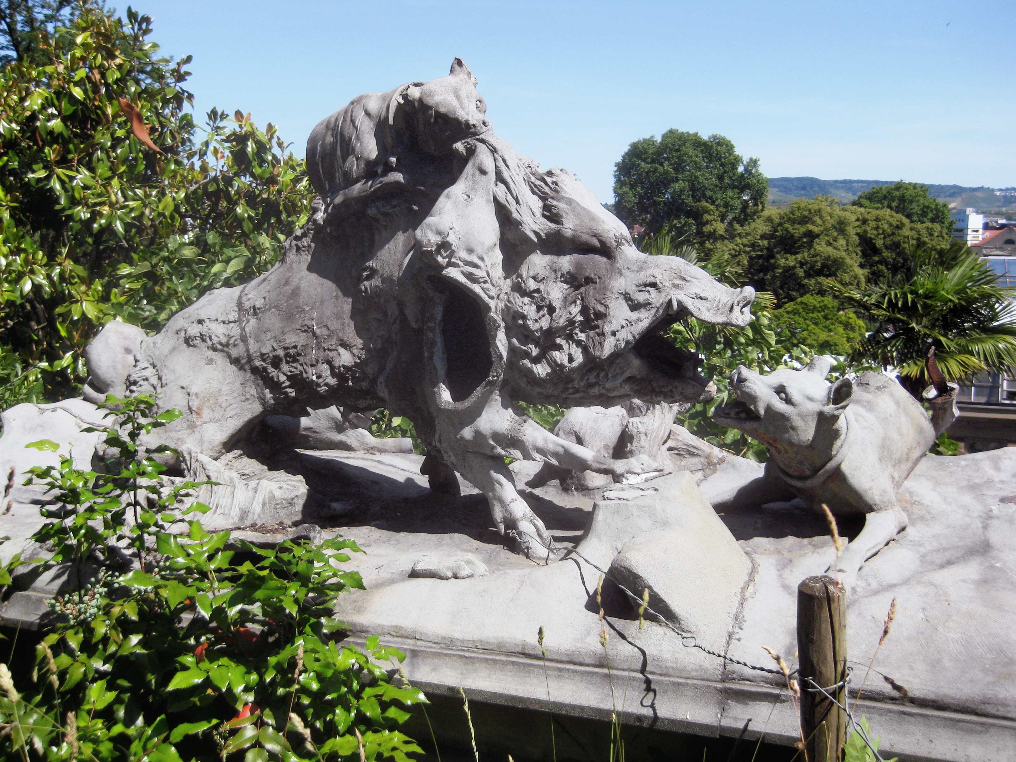 Albert Güldenstein / Guss: Wilhelm Pelargus: Eber mit Hunden (Rückansicht), Zinkguss, stark beschädigt, Entstehungsjahr 1853, Stuttgart, Wilhelma, rechts auf der hinteren Stützmauer der Terrassenanlage hinter dem Maurischen Landhaus.